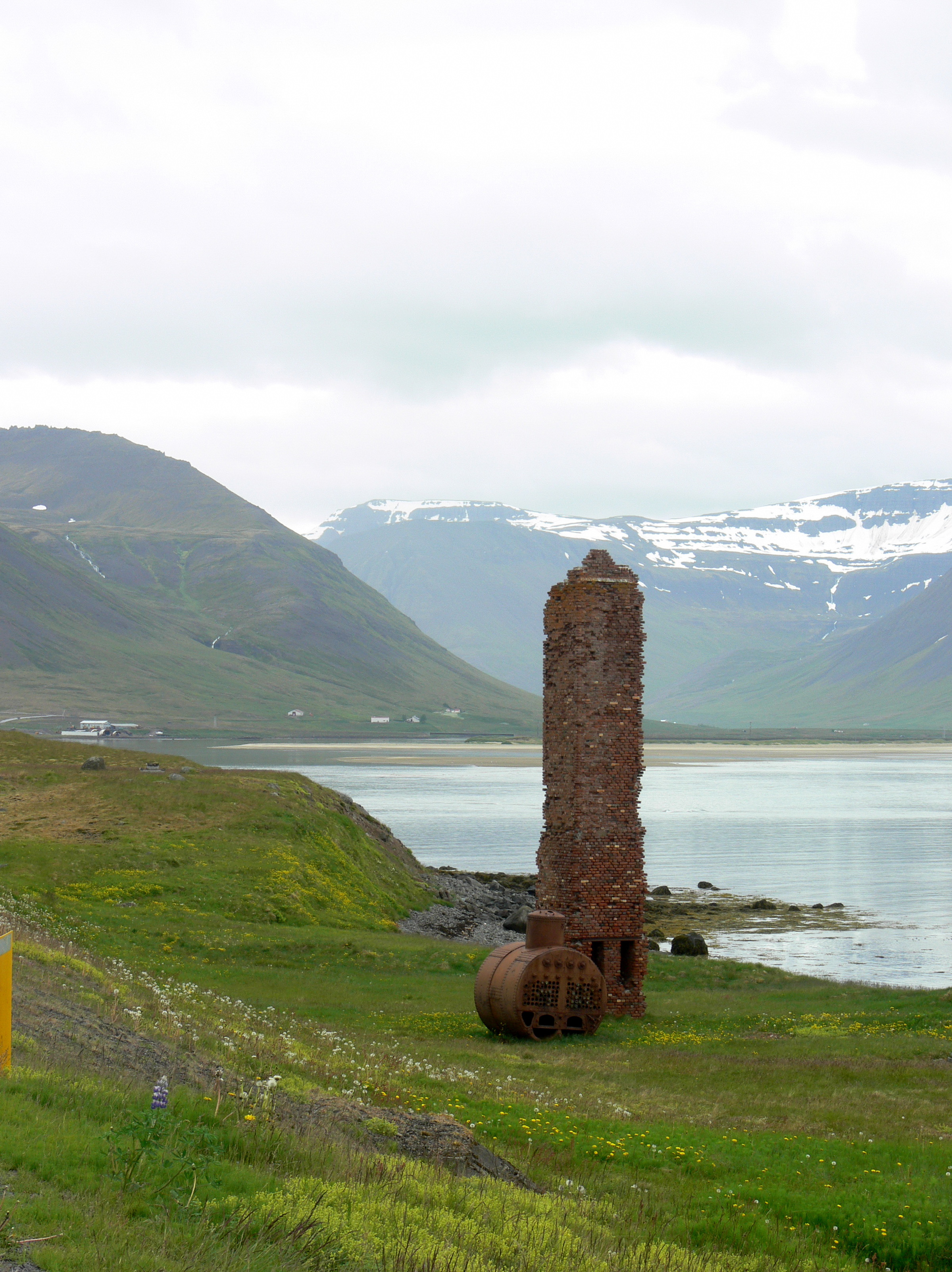 Önundarfjörður. Die Walfangstation in Sólbakki bei Önundarfjörður wurde 1889 erbaut und war eine der größten Walfangstationen, die von den norwegischen Walfängern in den Westfjorden gebaut wurden. Im Jahr 1901 fing die Station Feuer, als sie sich durch eine Lampe entzündete. Die Walfangstation in Sólbakki wurde im 20. Jahrhundert für den Straßenbau weitgehend zerstört. Von der Walfangstation sind nur noch Ziegel und Dampfkessel übrig.